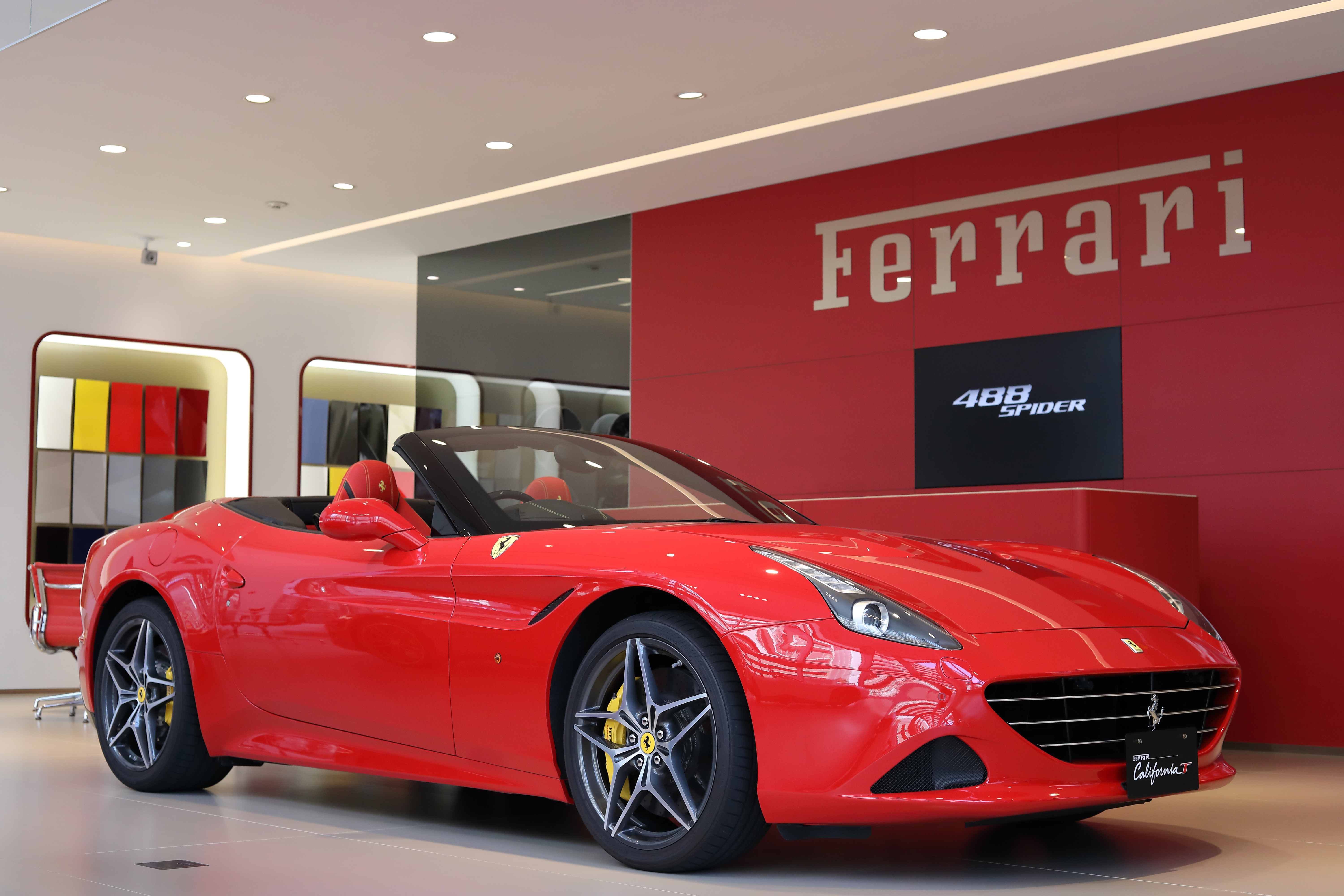 カリフォルニアT